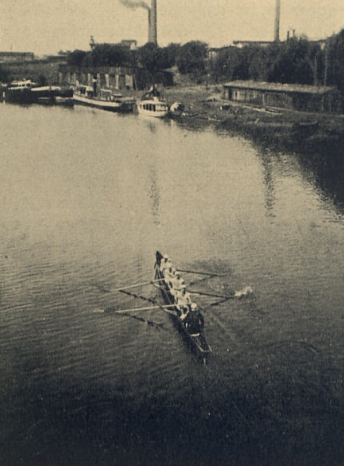 Polski Klub Wioślarski w Gdański - czwórka na ogólnopolskich zawodach w Bydgoszczy 1925